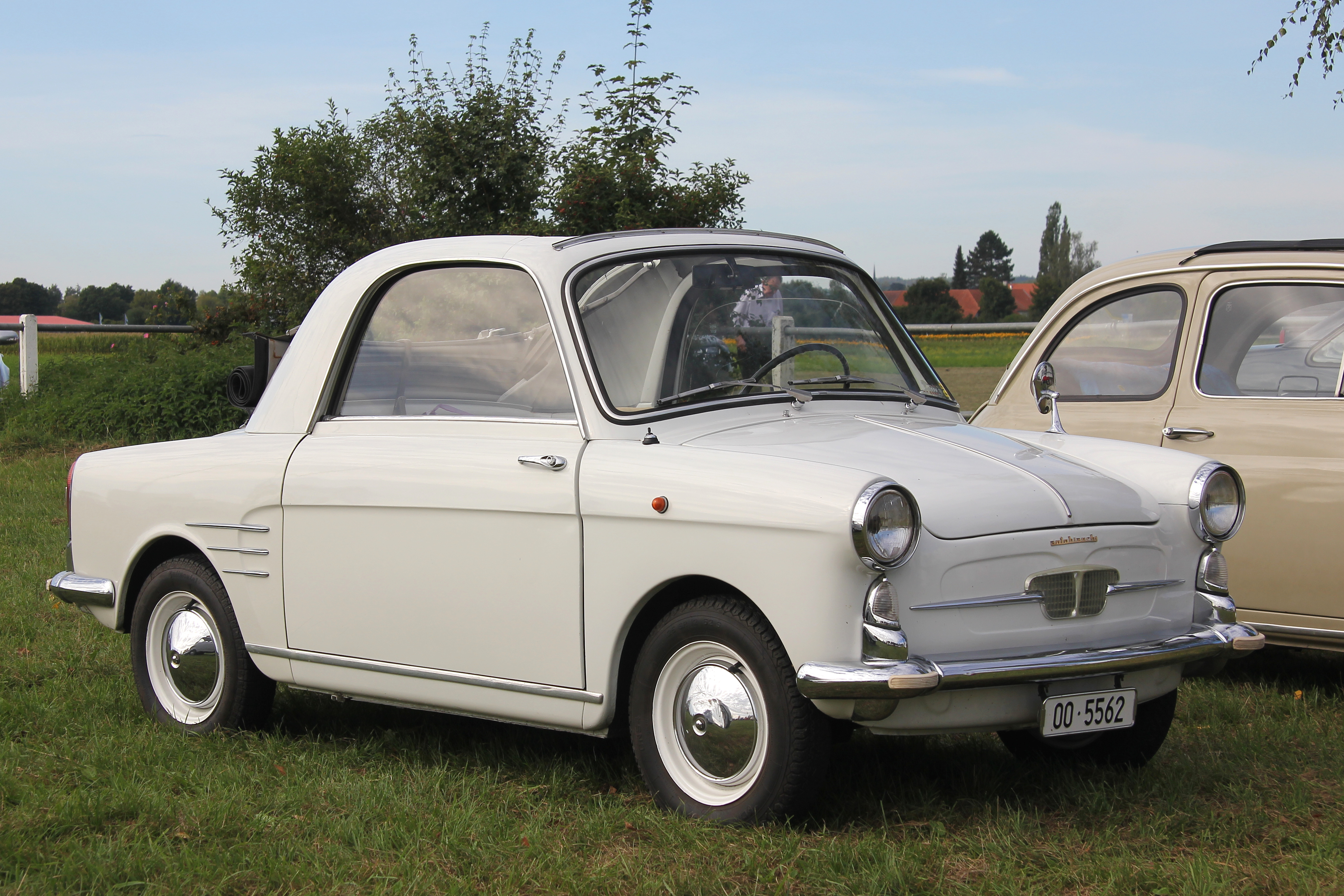 Autobianchi Bianchini special, Kleinstwagen auf der Basis des Fiat Nuova 500, Bauzeit 1958 bis 1962 (Kennzeichen des Fahrzeugs verändert) Teilnehmer als Gast beim 39. Isetta-Treffen in Bad Wörishofen